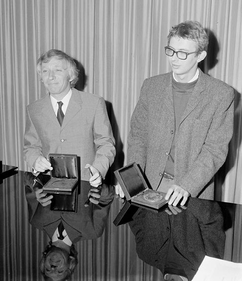 Prijswinnaars Hendrik Chabotprijs, links Matthieu Ficheroux, beeldend kunstenaar en rechts de winnaar van de Anna Blamanprijs: L. Leijnse, schrijver.